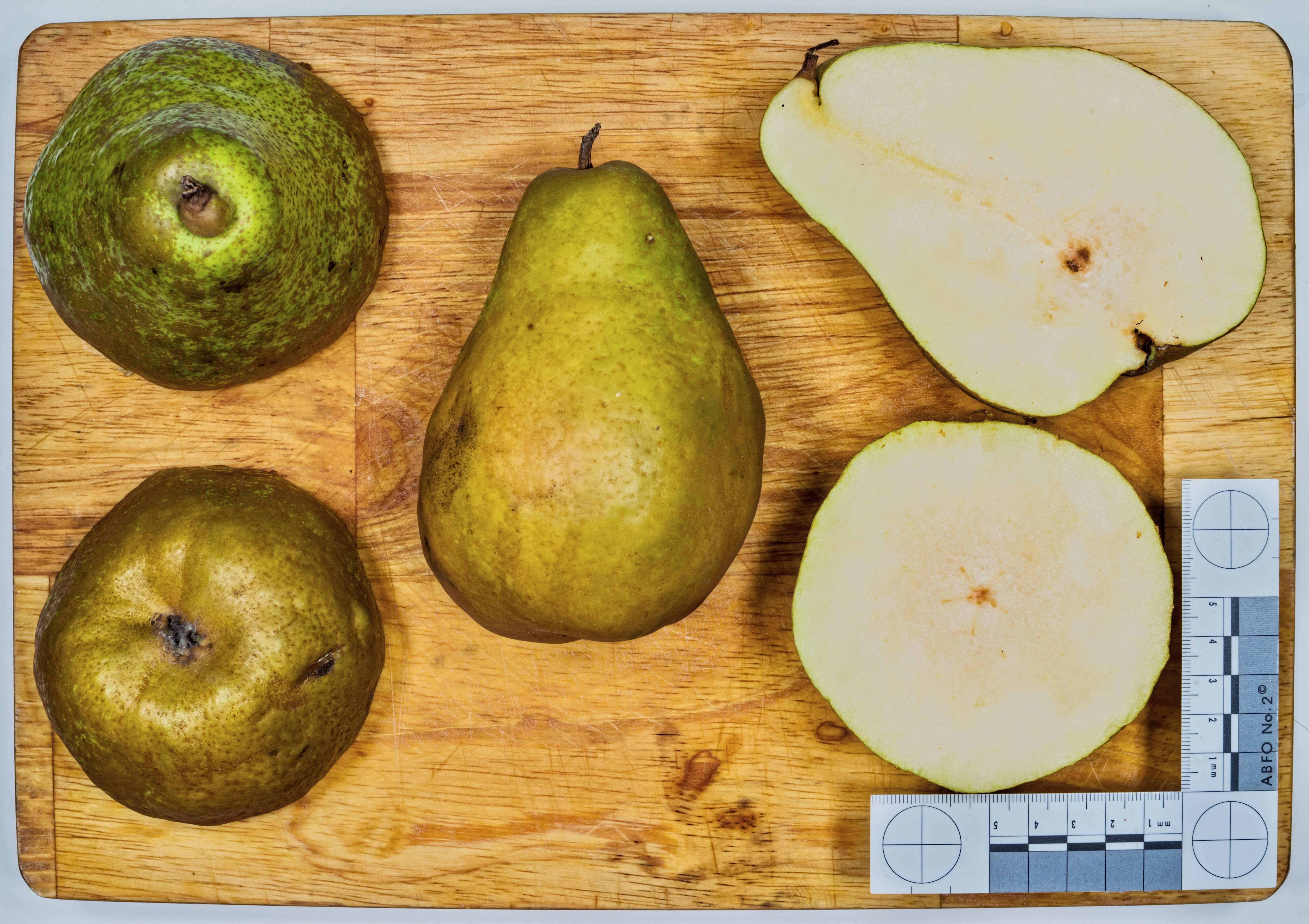 Birnenorte: Beurré Alexandre Lucas. Zufallsfund von Alexandre Lucas in einem Wald bei Blois in Frankreich. Erster Anbau 1874 von der Baumschule Transon in Orléans